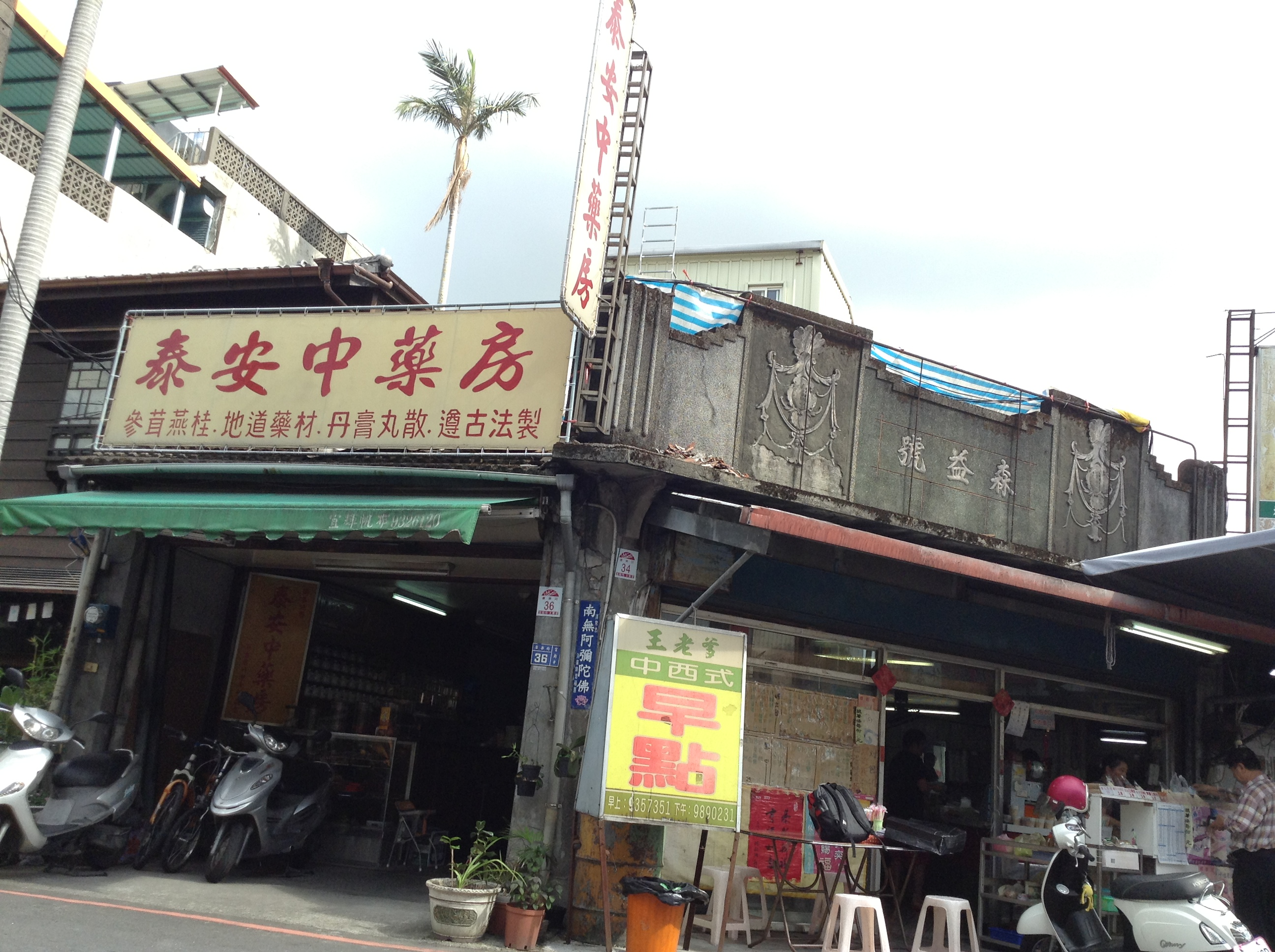 看起來頗老舊